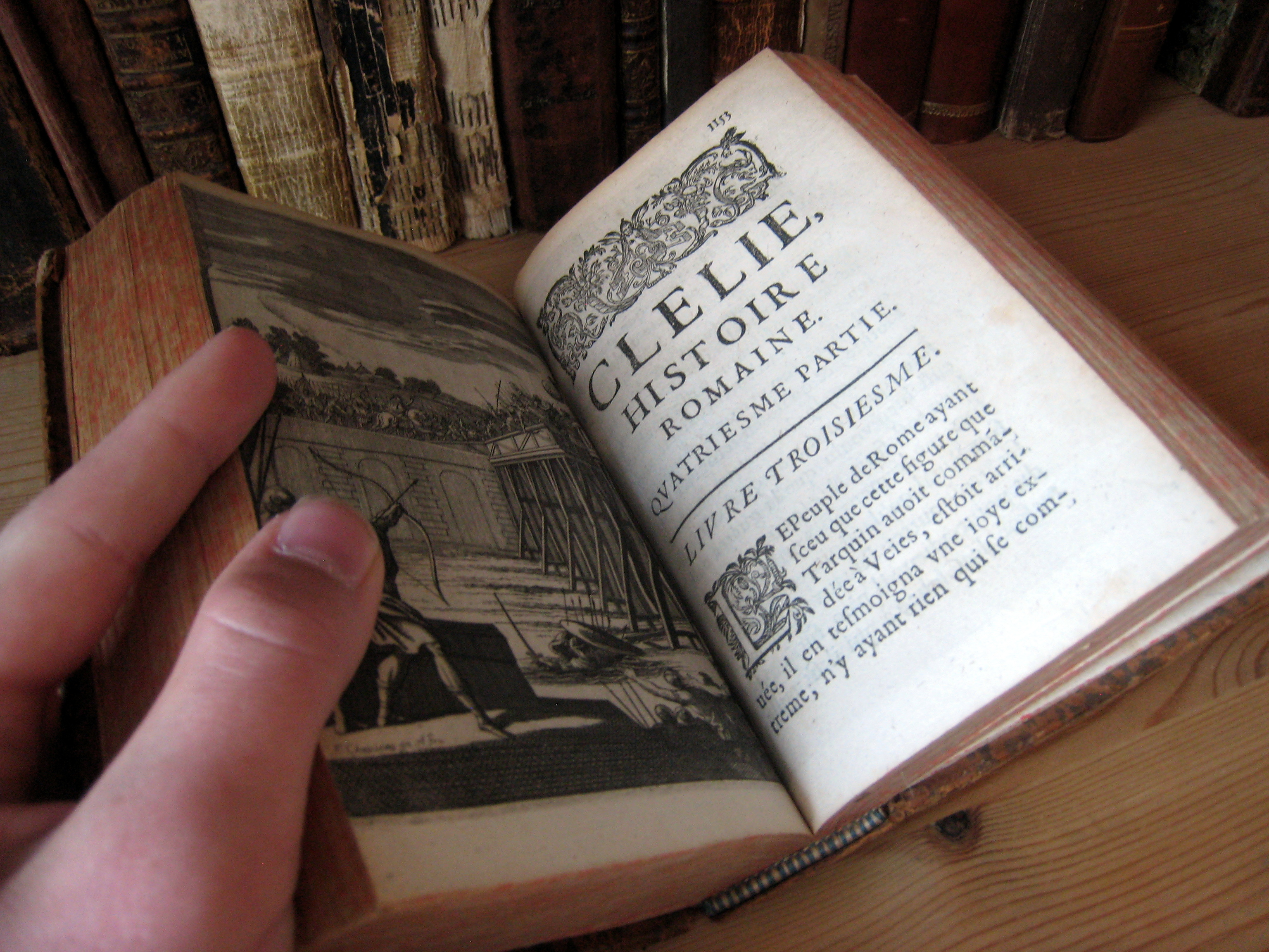 Bilde av kobberstikk-illustrasjon.